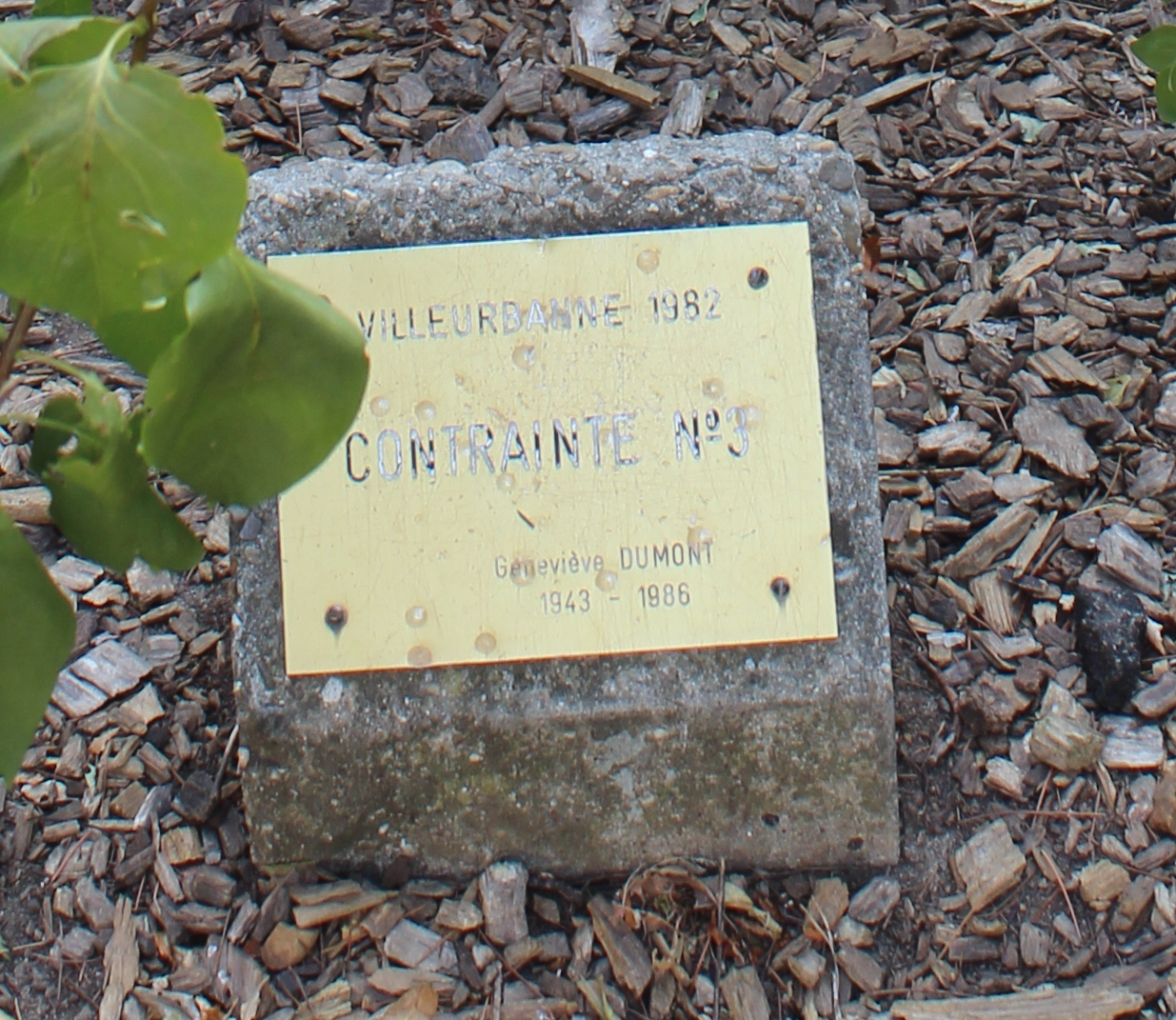 Panneau d'une oeuvre de Genevière Dumont à Villeurbanne : Contrainte n°3.